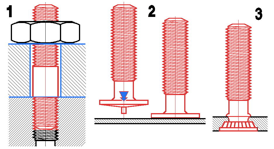 Dessin par moi même de goujons mecaniques. mis en domaine public.